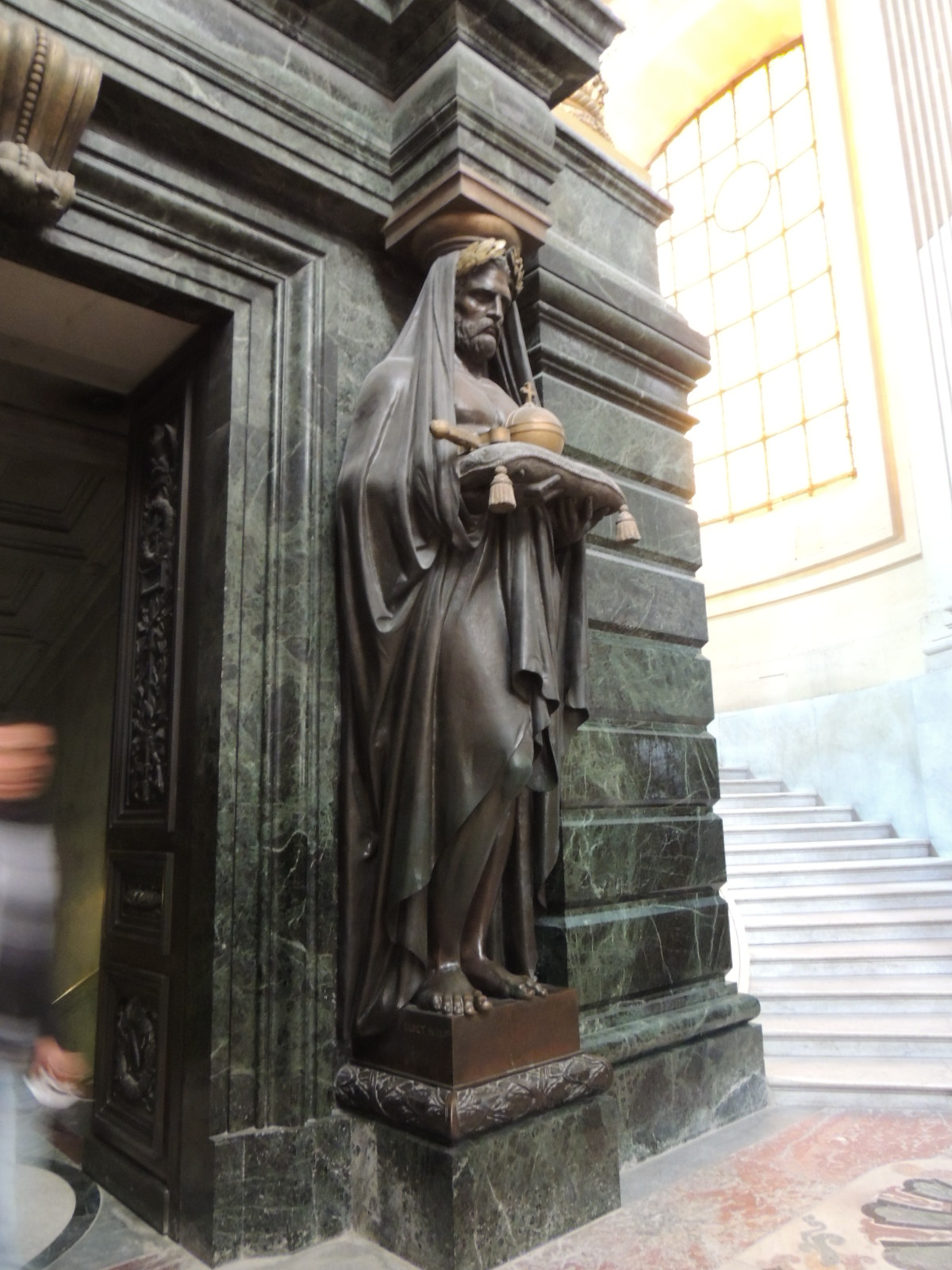 tombeau de Napoléon